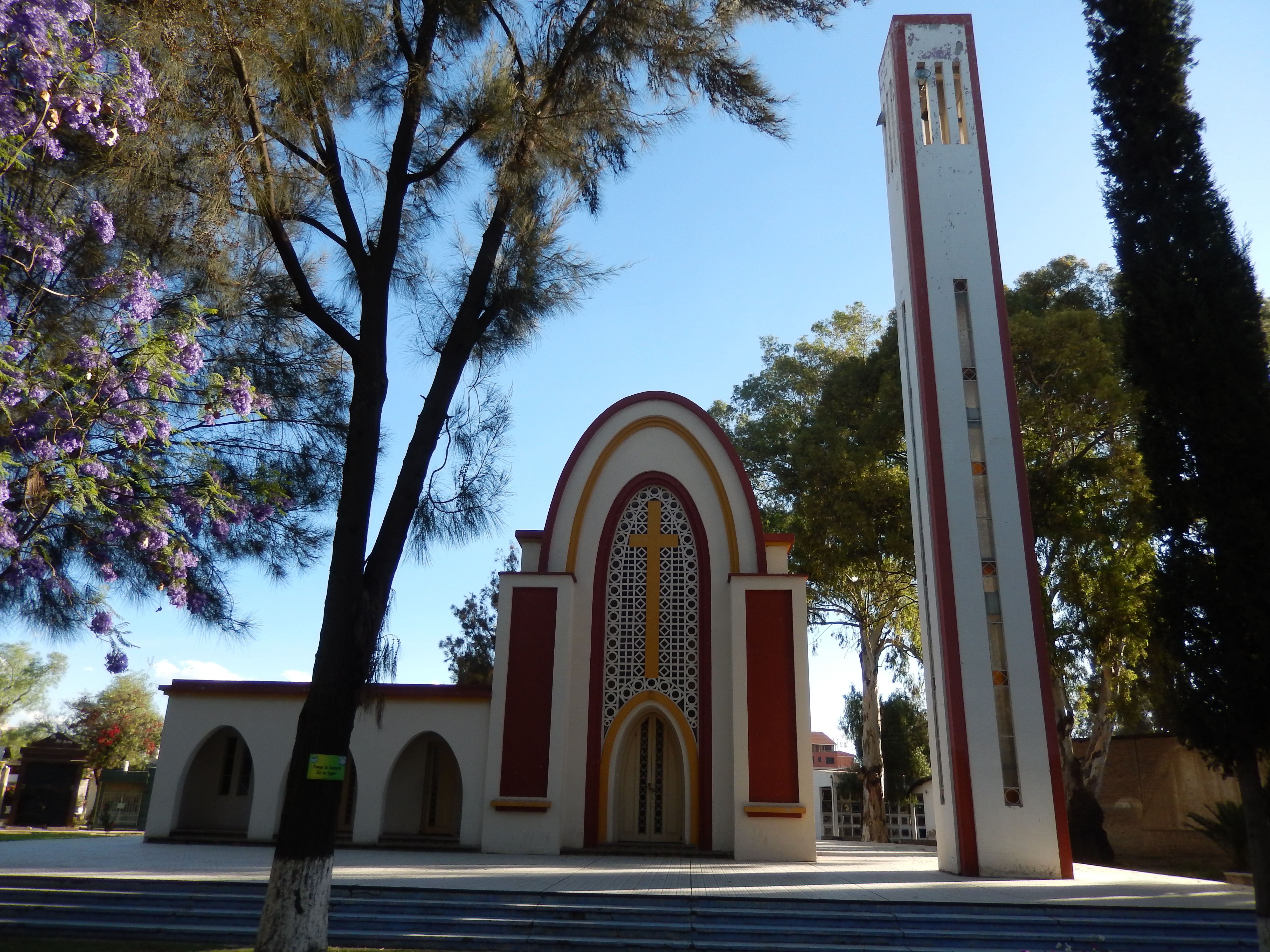 Capilla del Cementerio General This medium shows the protected monument with the number C/00-019 in Bolivia.